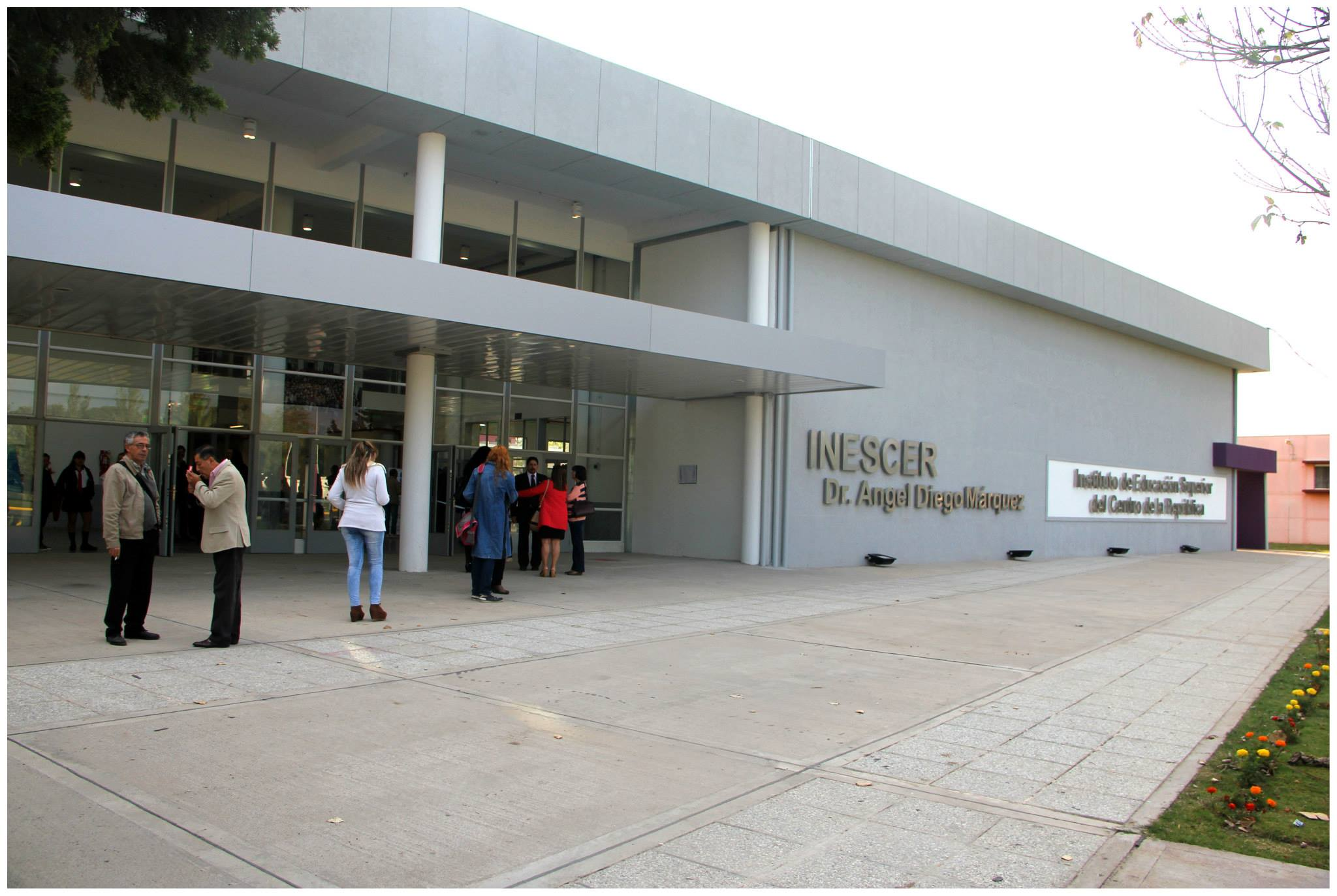 Edificio nuevo de INESCER.